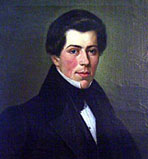 Ludwig Andreas Jordan (1811-1883) in jungen Jahren